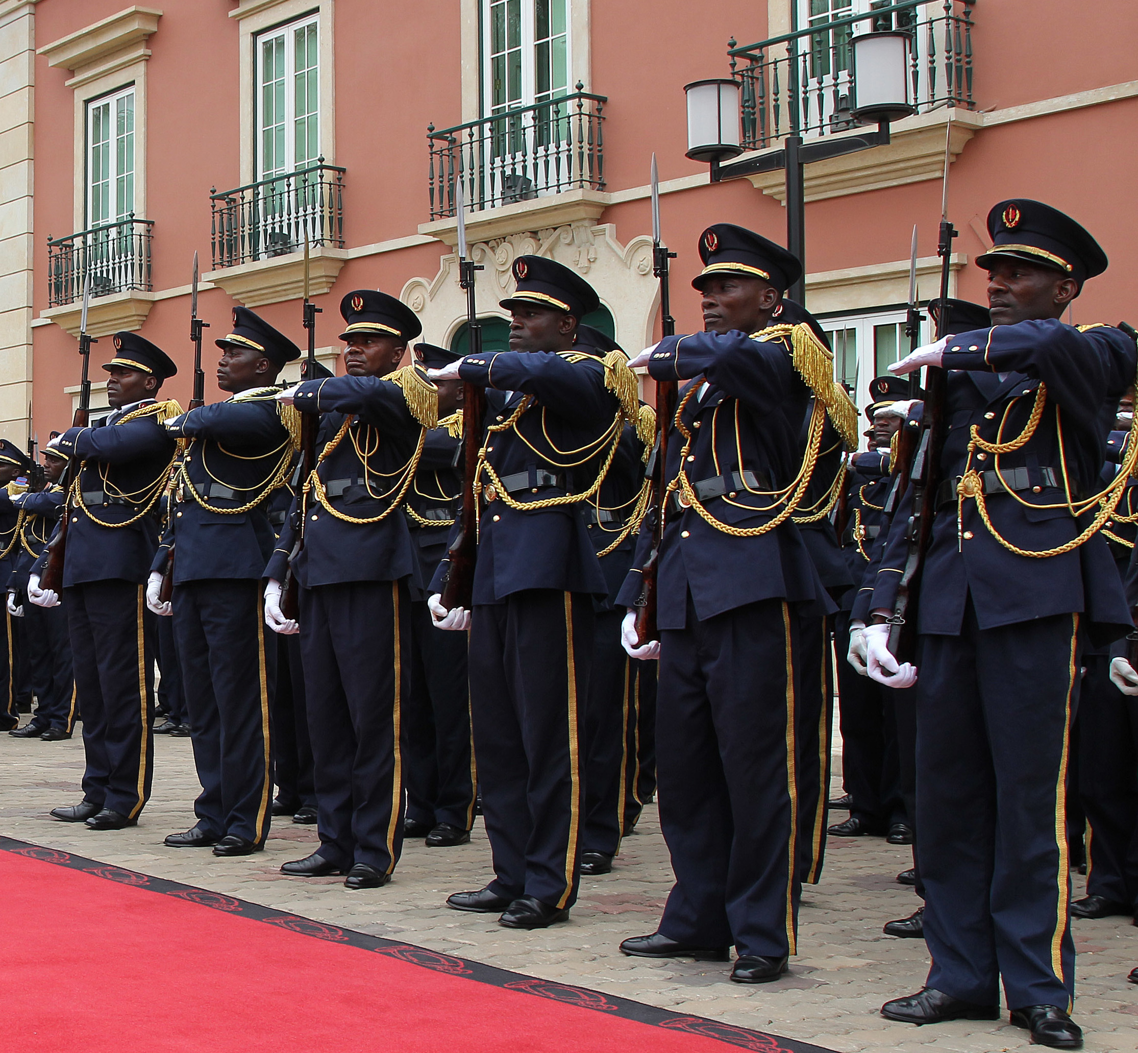 Presidenta Dilma Roussef, durante cerimônia Oficial de chegada a Luanda. (Luanda-Angola, 20/10/2011)